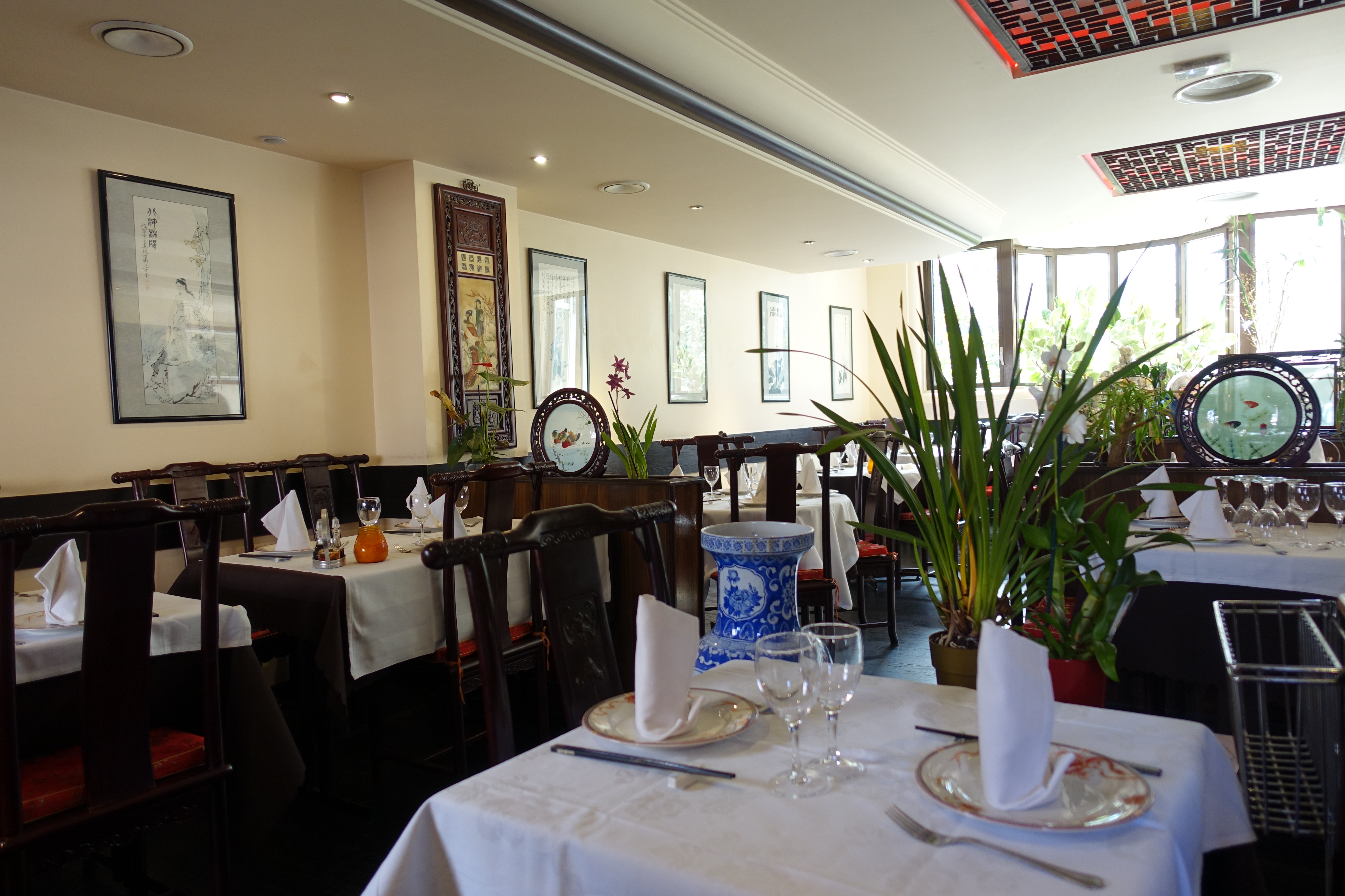 La Table de Chine @ Montparnasse @ Paris